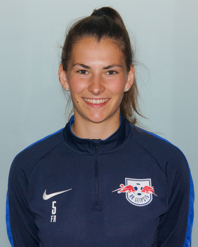 Johanna Kaiser (RB Leipzig)